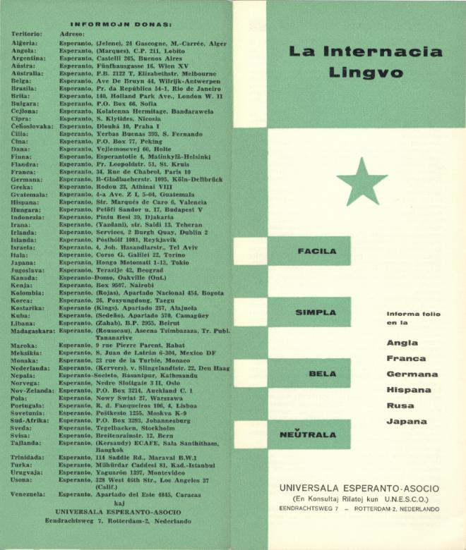 UEA-varbilo en dek lingvoj, 1962. Fronto kaj dorso. Vd. ankaux Dosiero:1962-UEA-varbilo02.jpg.